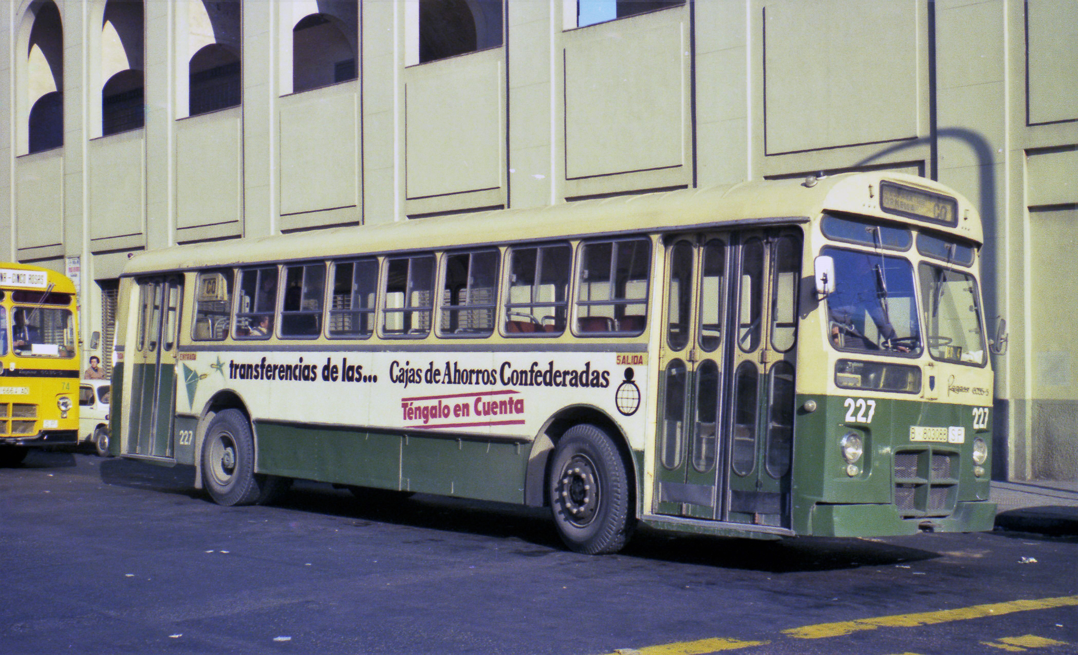 El autobús Pegaso 6035 número 227 de Urbanizaciones y Transportes S.A., en la terminal de las líneas suburbanas en la calle Llansá de Barcelona, prestando servicio en la línea CO a Cornellá de Llobregat.